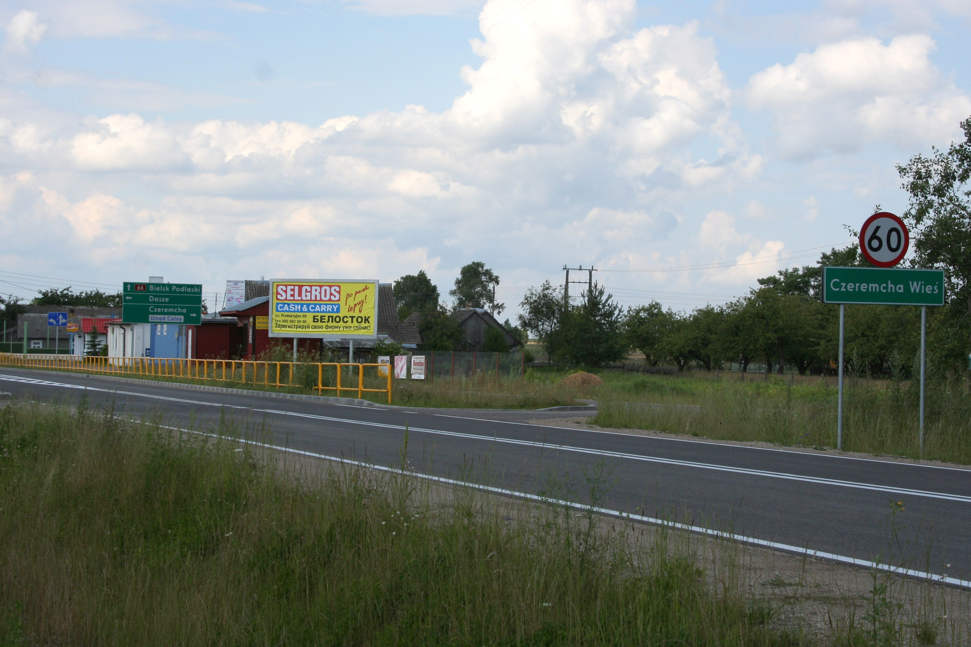 Droga wjazdowa do Czeremchy-Wsi, cześć DK66.